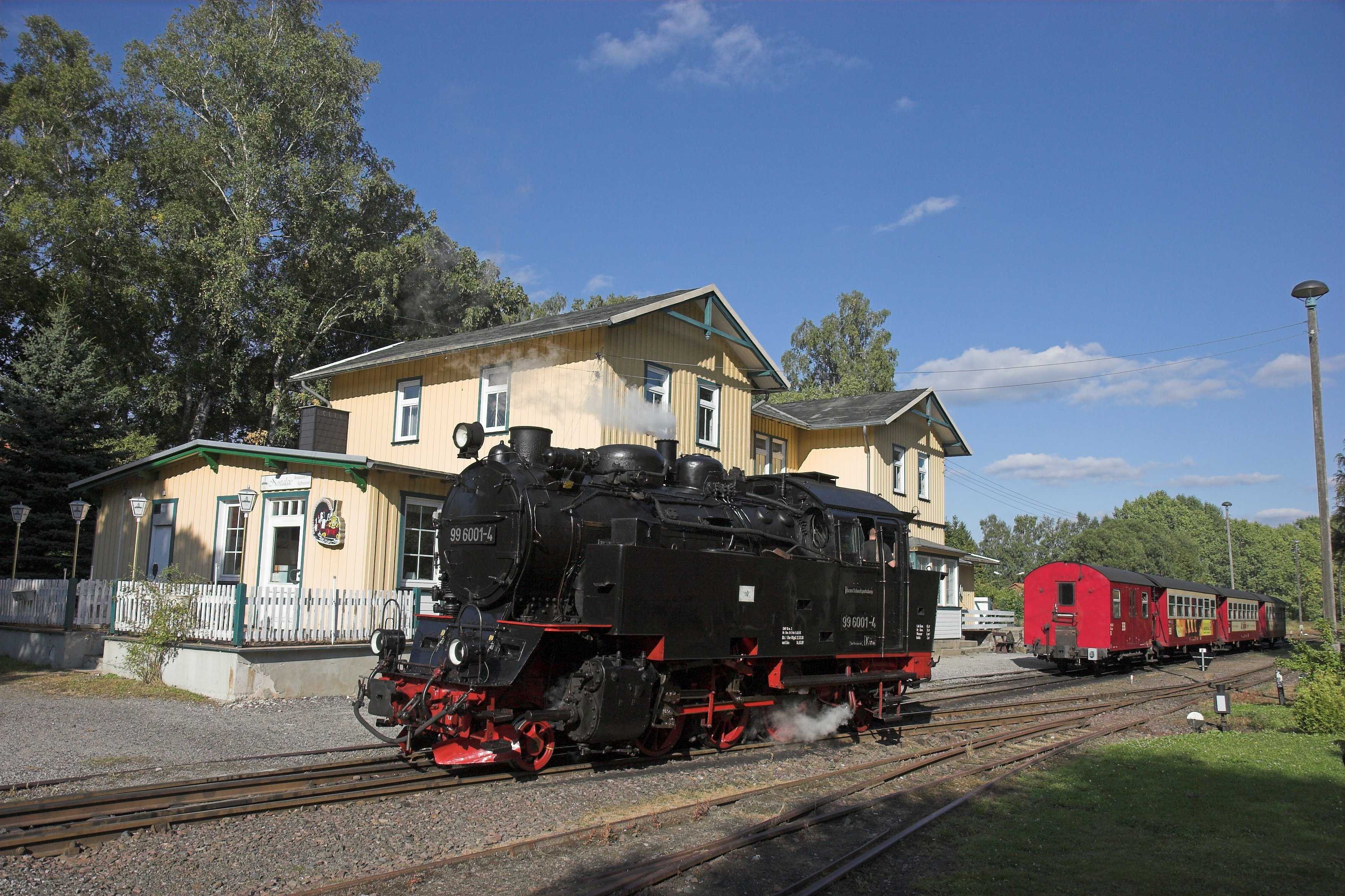 Die Selketalbahn beim Umsetzen der Lok im Endbahnhof Hasselfelde